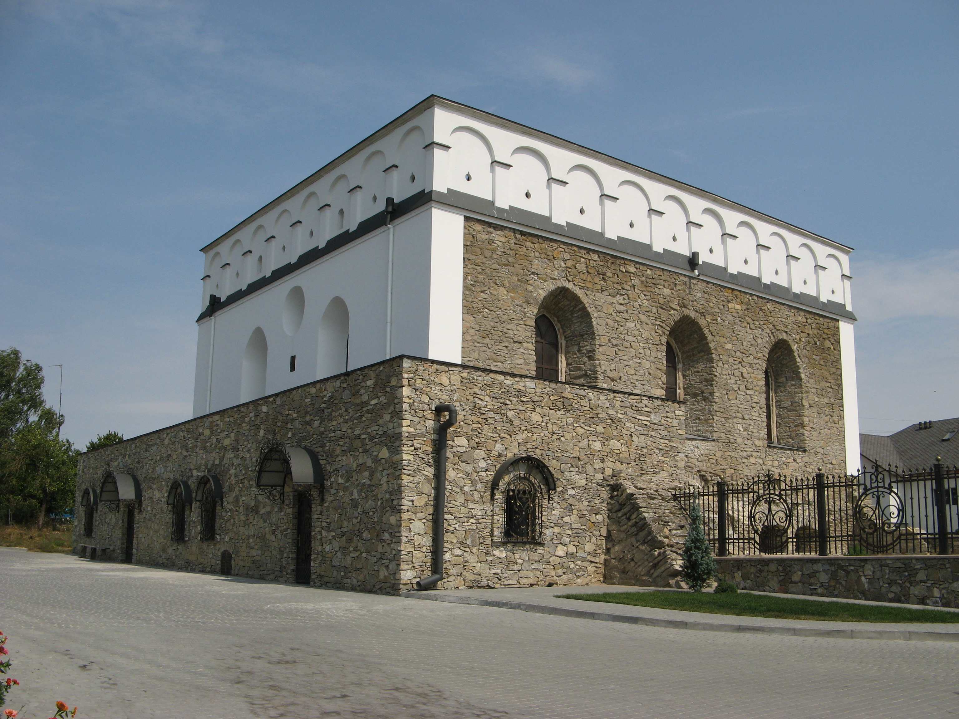 Відновлена синагога в смт Сатанів (Хмельницька обл.), 2015 рік